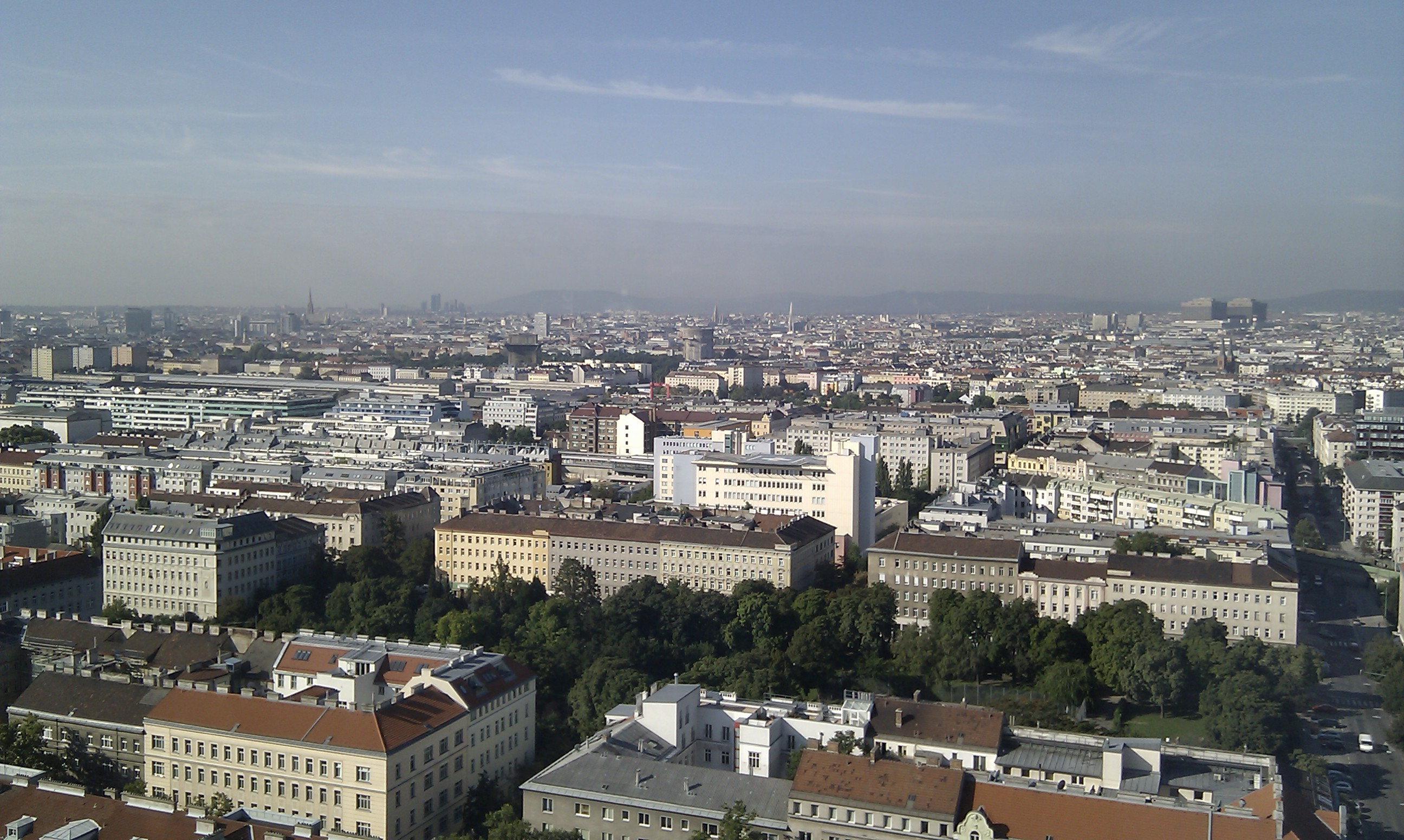 Blick vom Millennium Tower nach Südwesten